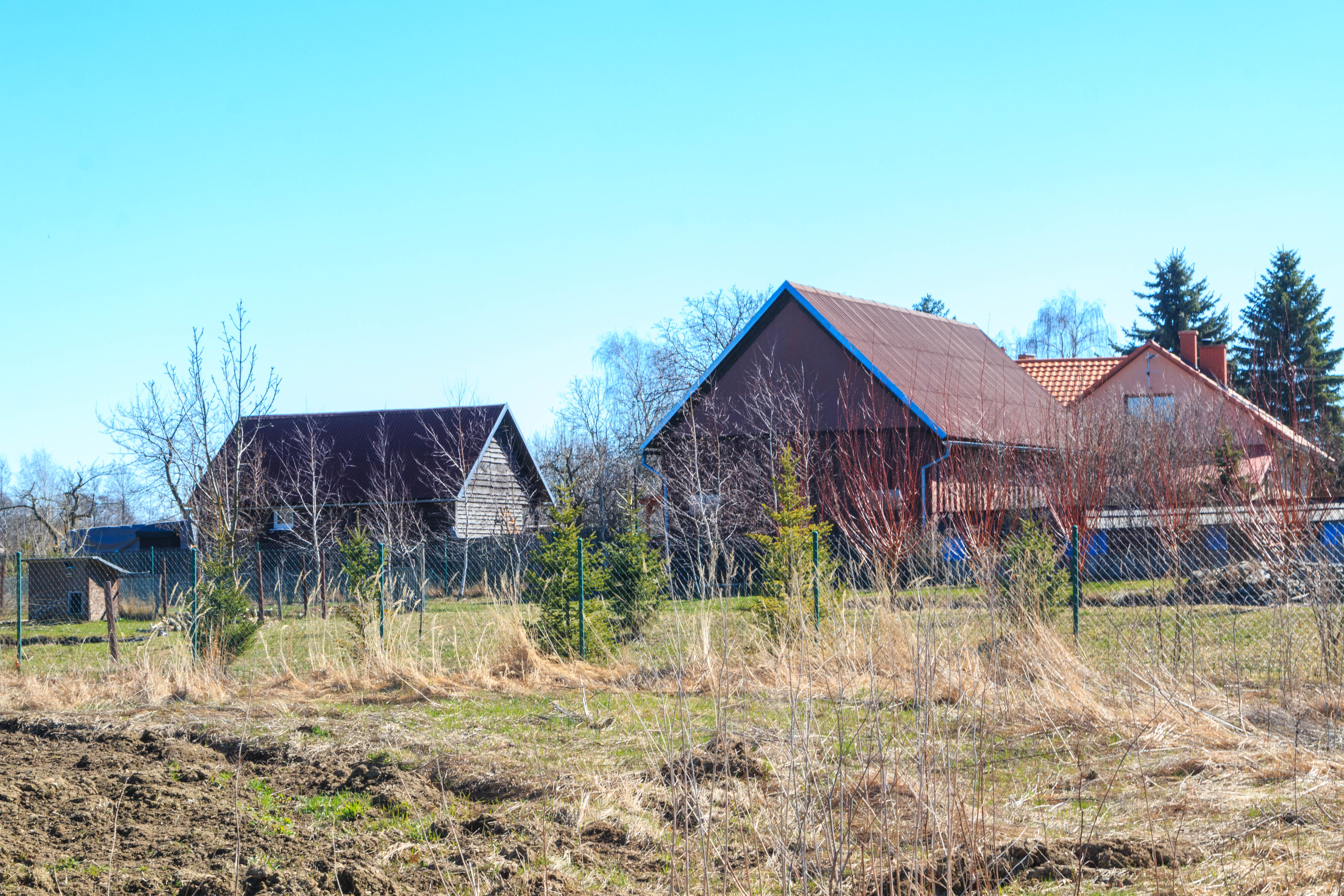 Osada Pastvisko u Proseče